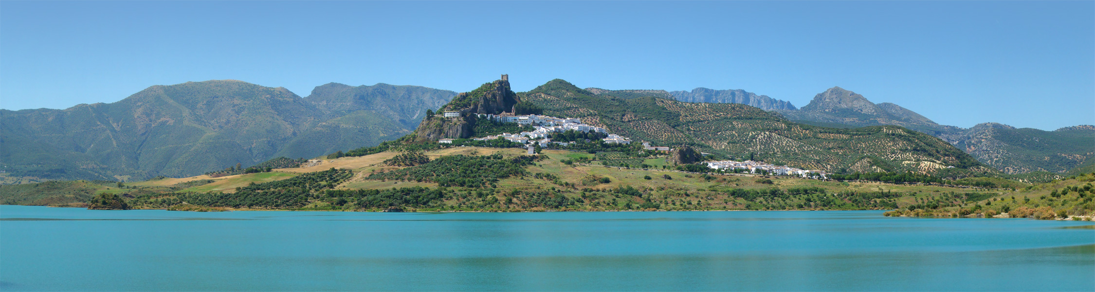 Zahara de la Sierra, Andalucía, España.